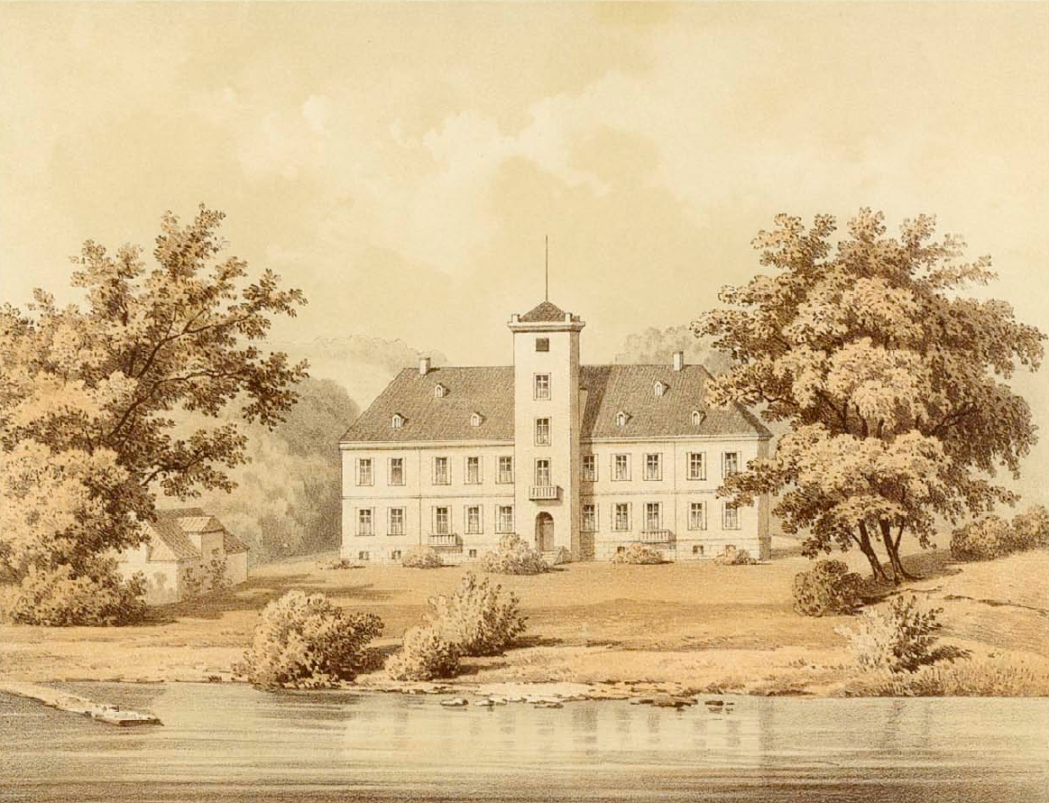 Schloss Oefte in Essen-Kettwig, Lithographie von Alexander Duncker